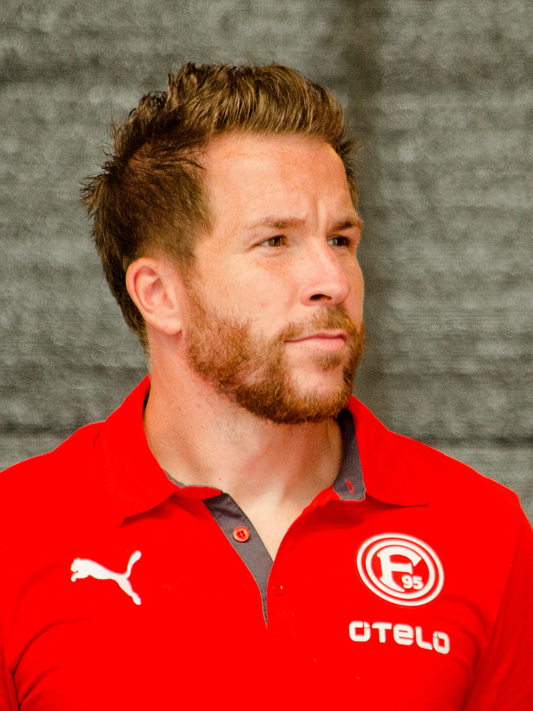 Christian Weber, deutscher Fußballspieler